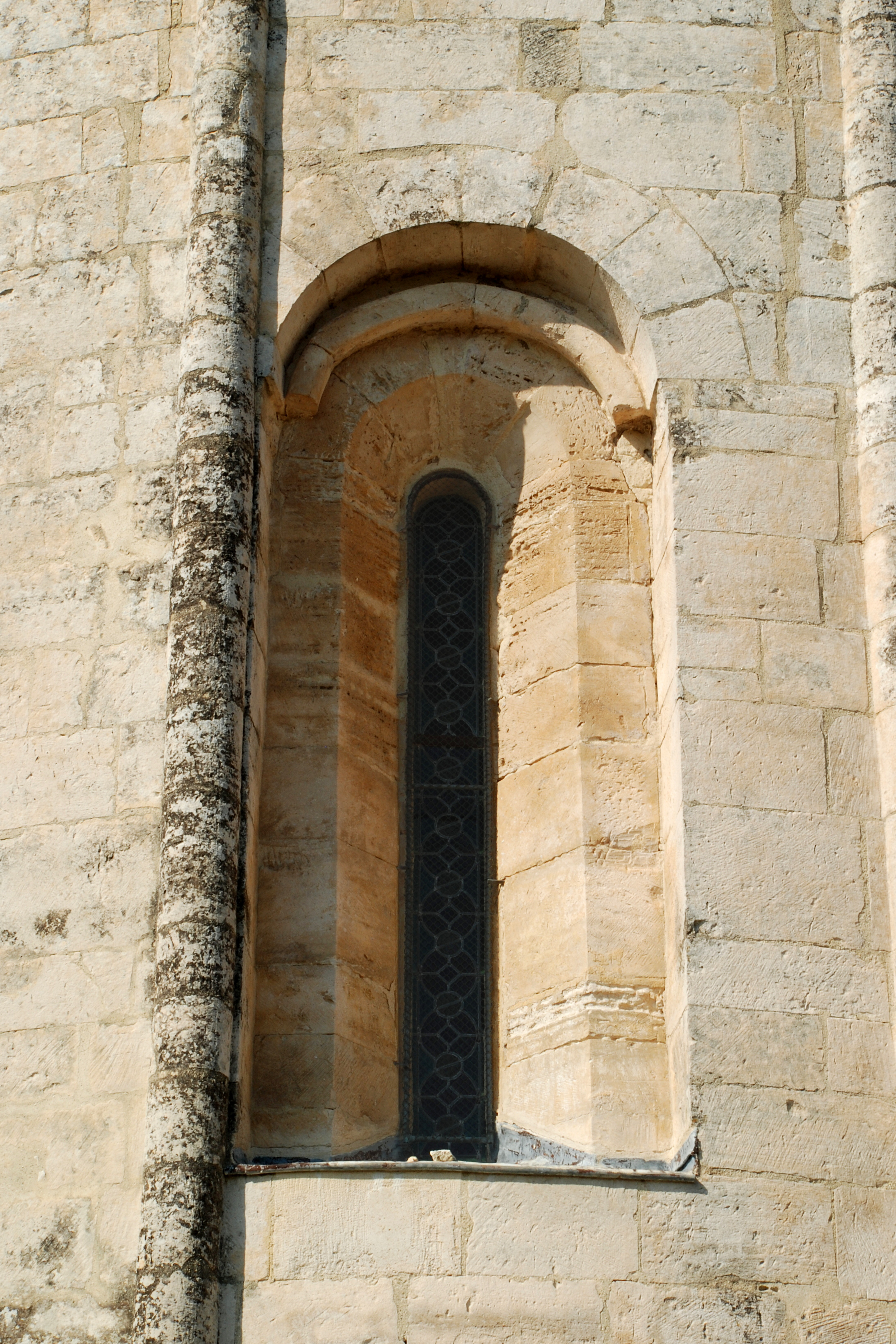 France - Languedoc - Hérault - Église de Saint-Vincent-de-Barbeyrargues